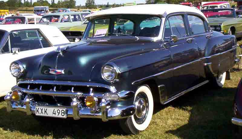 1954 Chevrolet Two-Ten Deluxe Series, Model 2103 4-Door Sedan